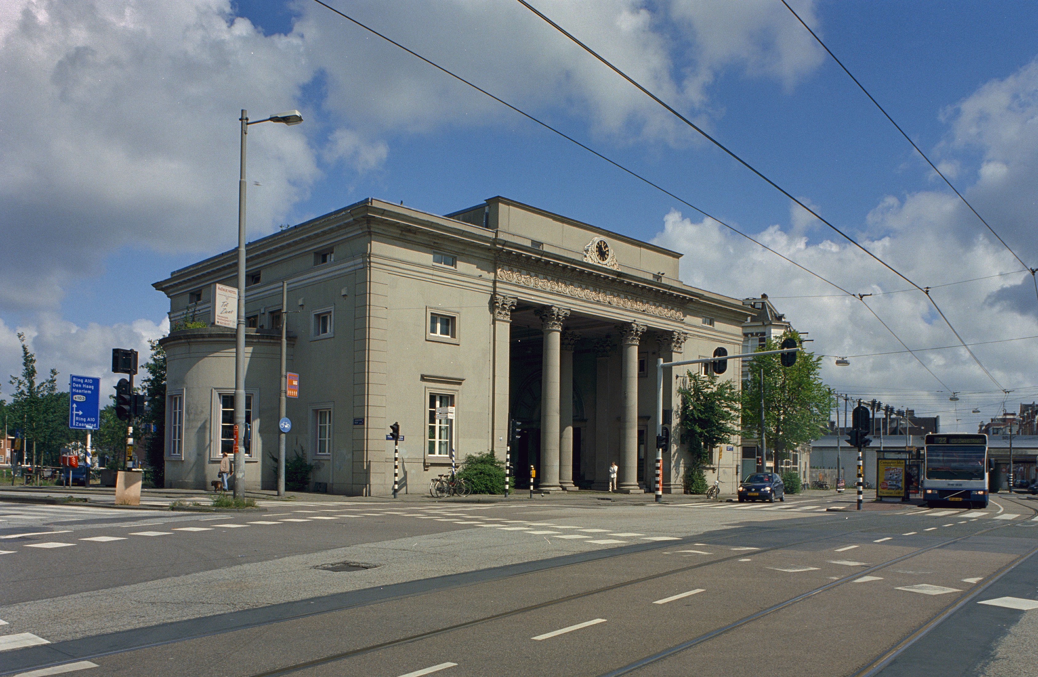 Haarlemmerpoort: Overzicht